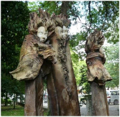 konstruajxo de artisto Gábor Varga